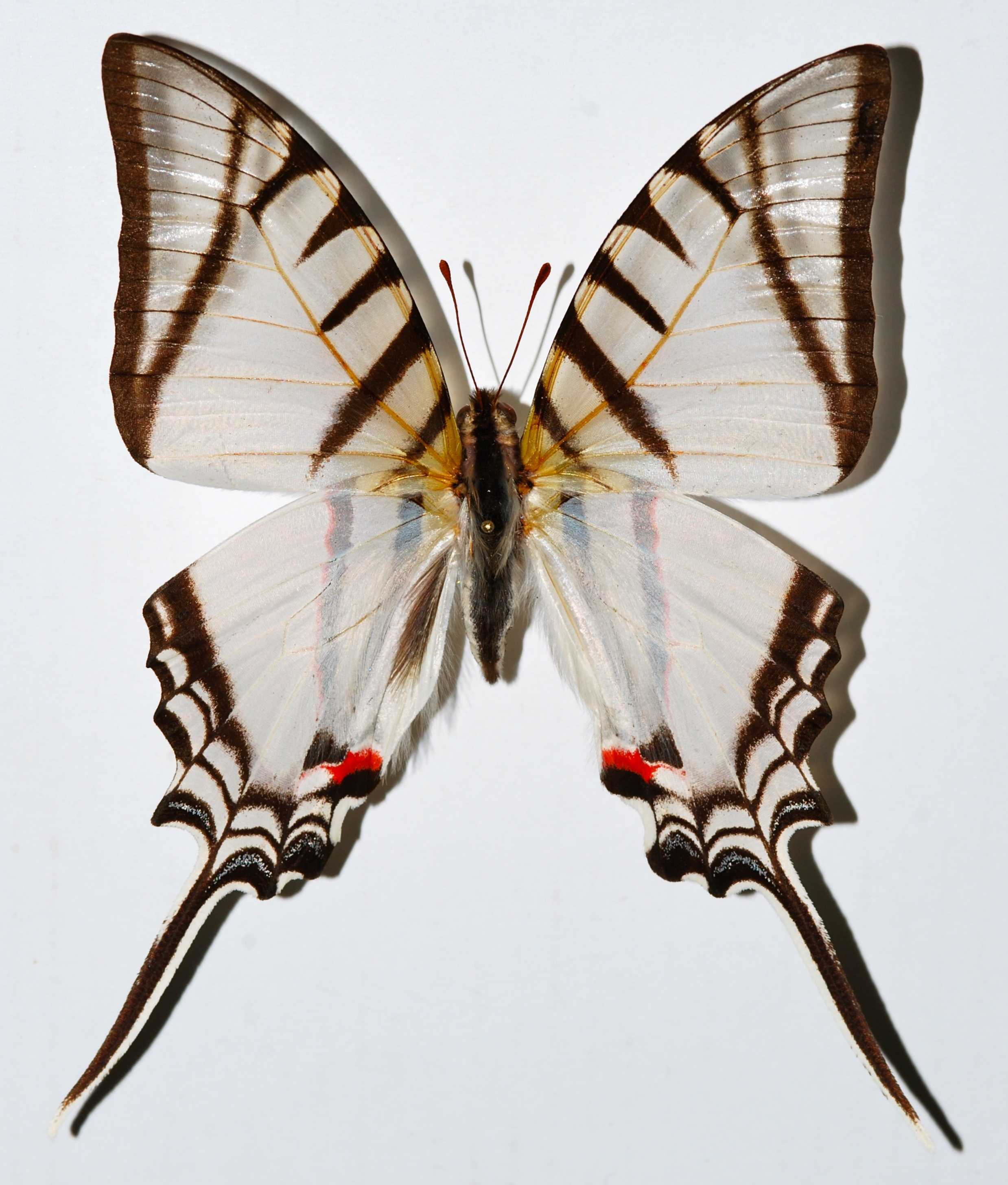 Satipo, PERU